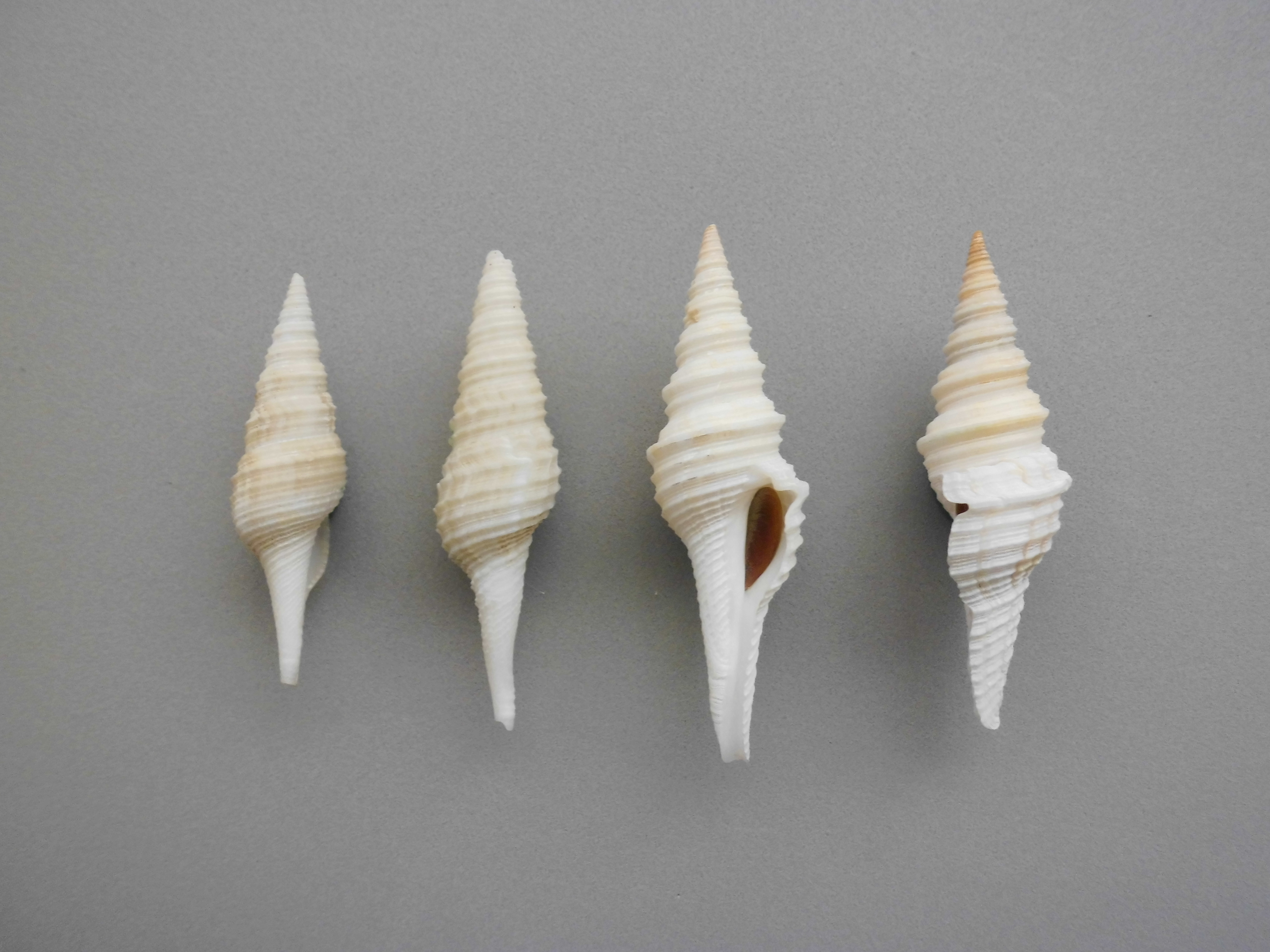 Polystira albida (G. Perry, 1811) colectado al sur del Archipiélago Las Aves, Dependencias Federales - Venezuela